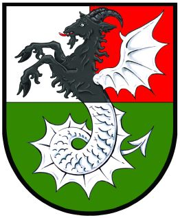 Česky: znak obce Malhotice